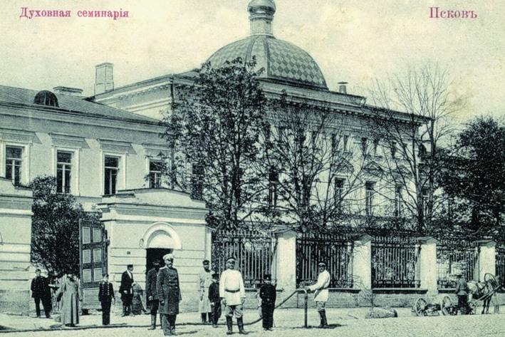 Здание Псковской духовной семинарии